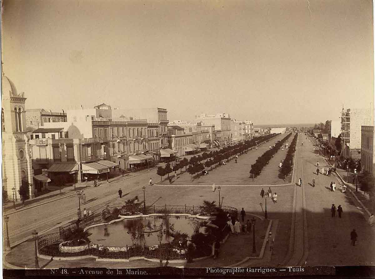 Avenue de la Marine, future avenue Jules Ferry puis avenue Habib Bourguiba, vers 1885 Bertrand Bouret